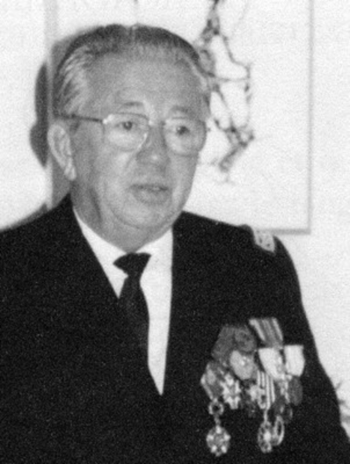 Le médecin général Edmond Reboul_1923-2010